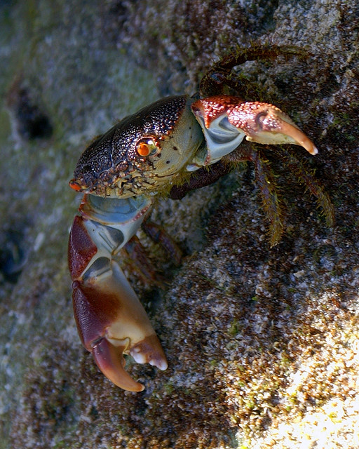 Crab (Oman)